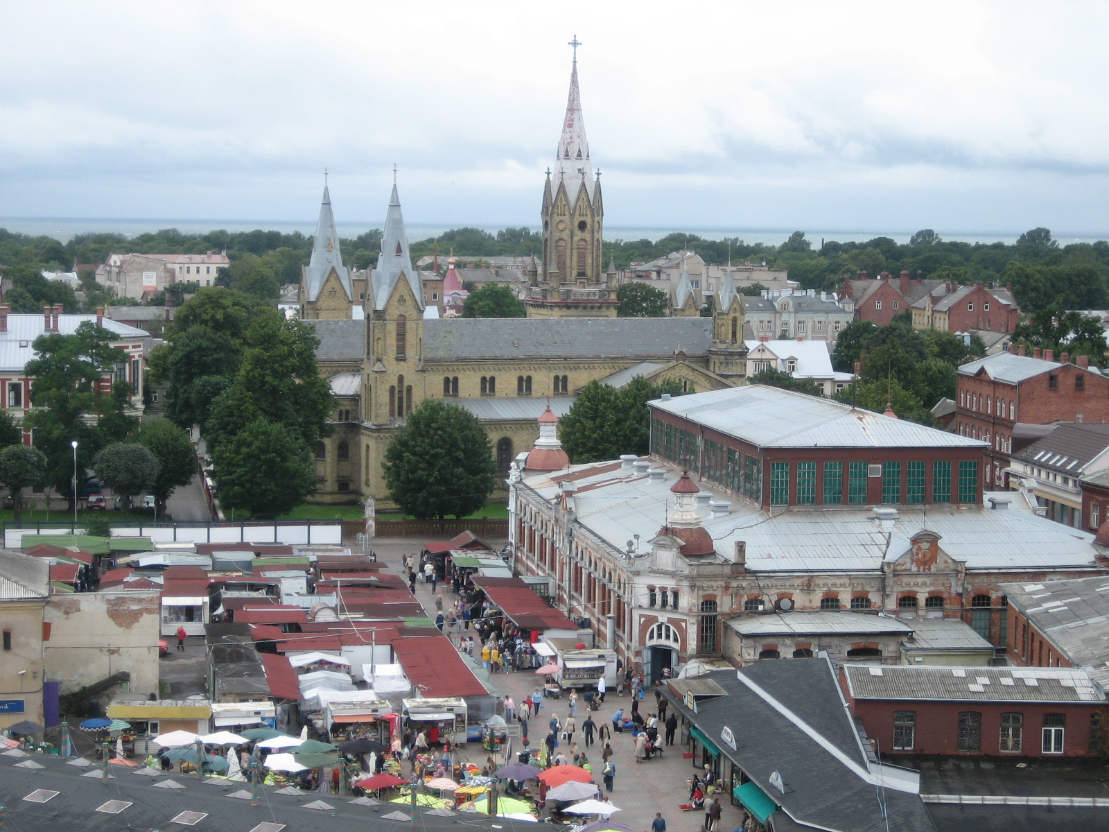 Vue op de Maart an d'St.-Josef-Kathedral vu Liepaja.